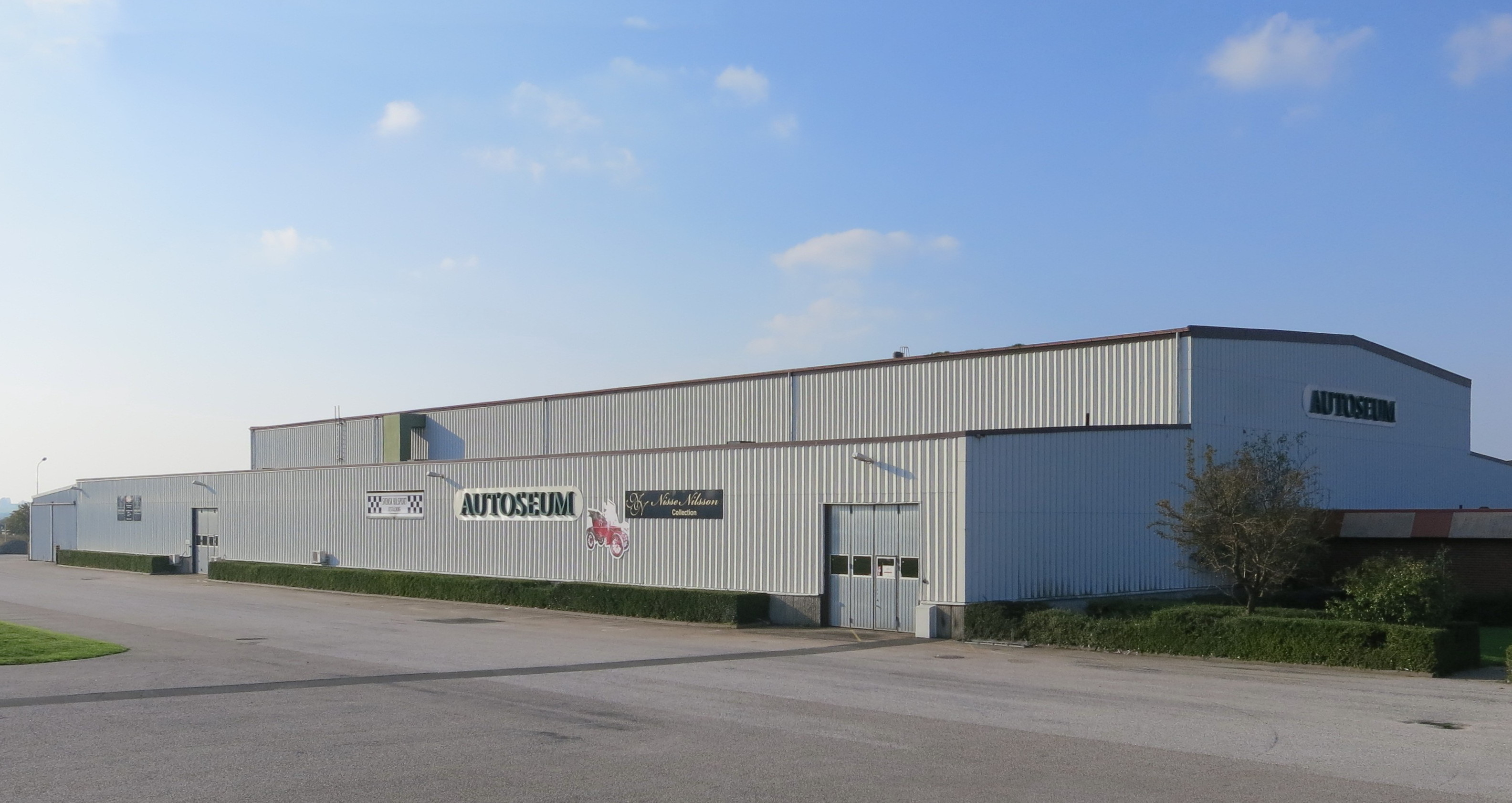 Autoseum, Simrishamn